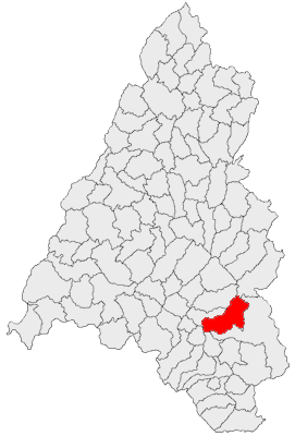 Categorie:Hărţi ale judeţului Bihor